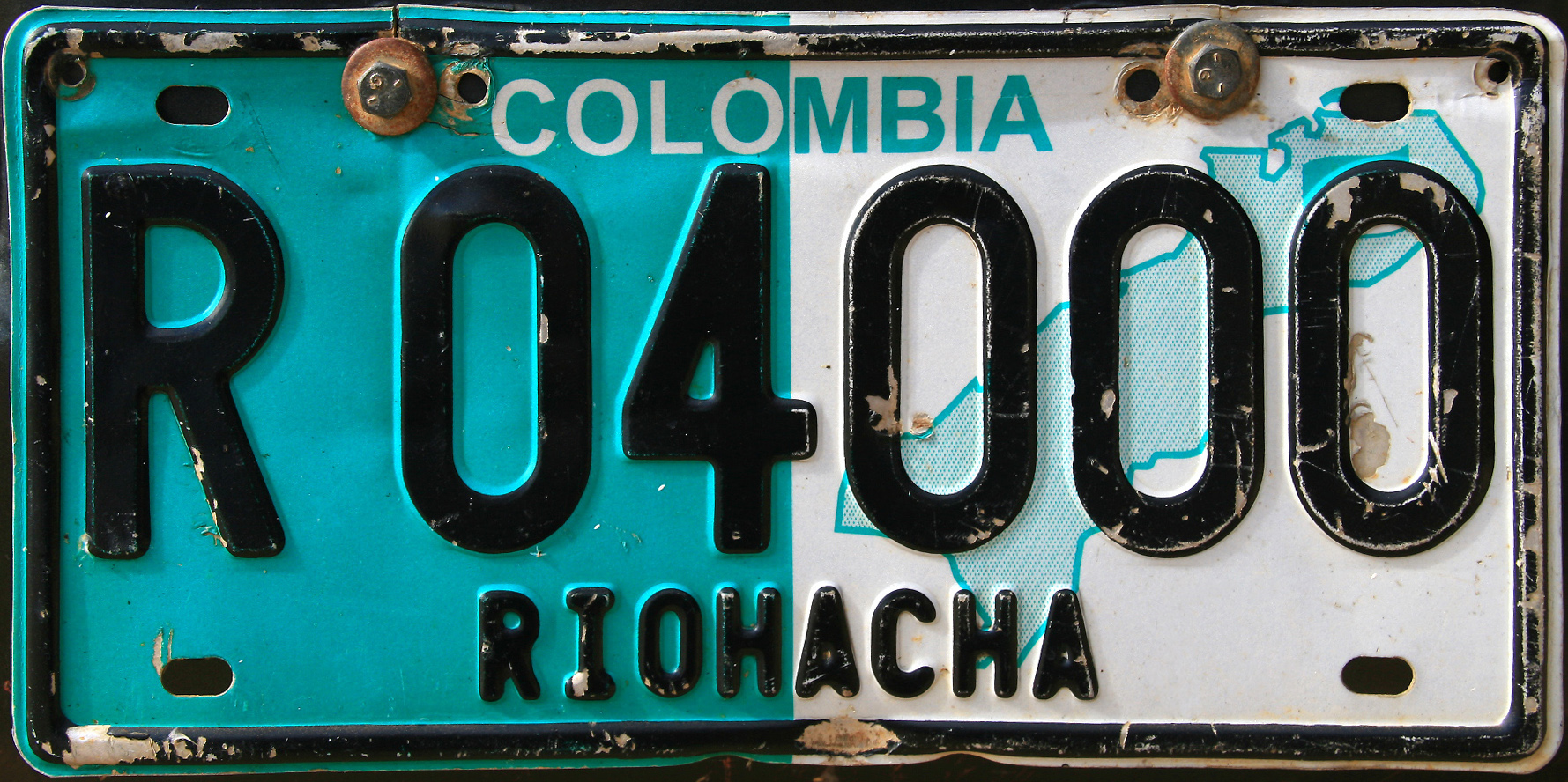 License plate Riohacha Colombia 2008 series